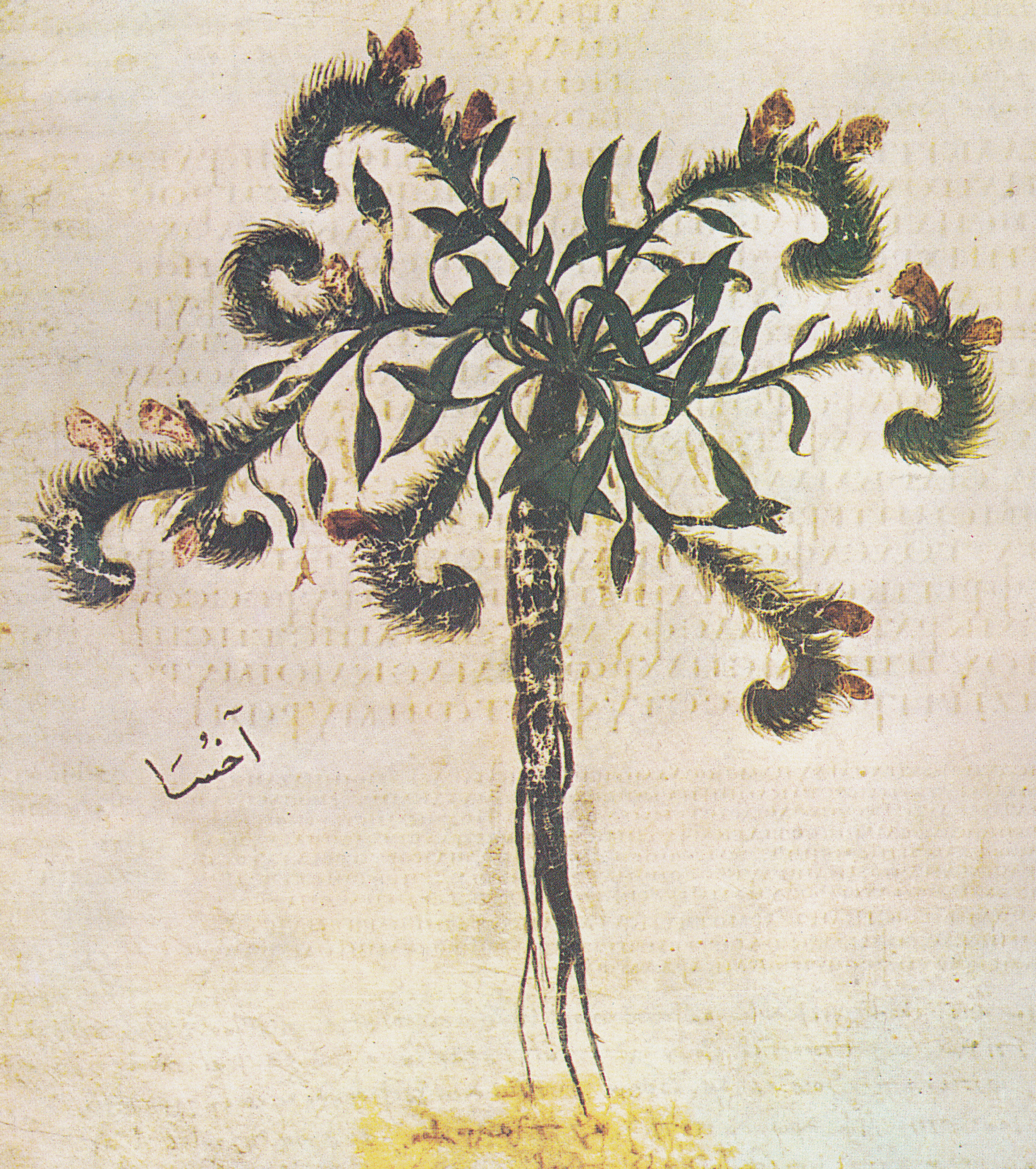 Abbildung einer Ochsenzungen-Art